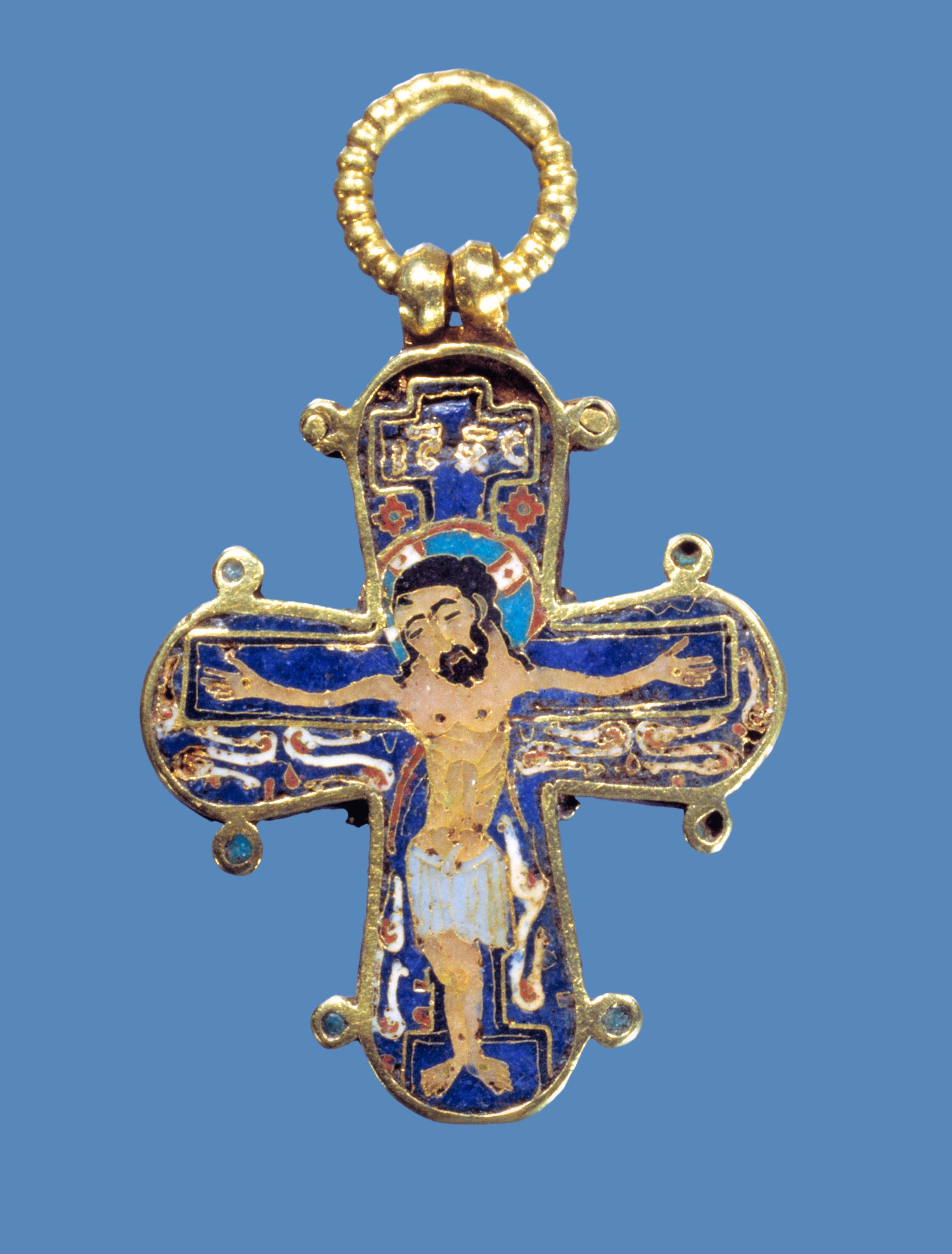 Byzantinsk relikviekors udført af guld med emalje i celle-emaljeteknik, fundet i en grav i Ringsted S. Bendts Kirke i 1600-tallet og indsendt til Det kongelige Kunstkammer, hvor man formodede, at det havde tilhørt Valdemar Sejrs dronning Dagmar. Korset kaldes derfor Dagmarkorset. Dateringen er omdiskuteret og spænder fra 1000-tallet til omkring 1200.En kopi af korset blev i 1863 givet af kong Frederik 7. som bryllupsgave til den danske princesse Alexandras bryllup med den engelske tronfølger Edward (7.). Siden er kopier af korset i sølv og guld blevet populære i Danmark til dåb og konfirmation. Datering: 1000-årene.